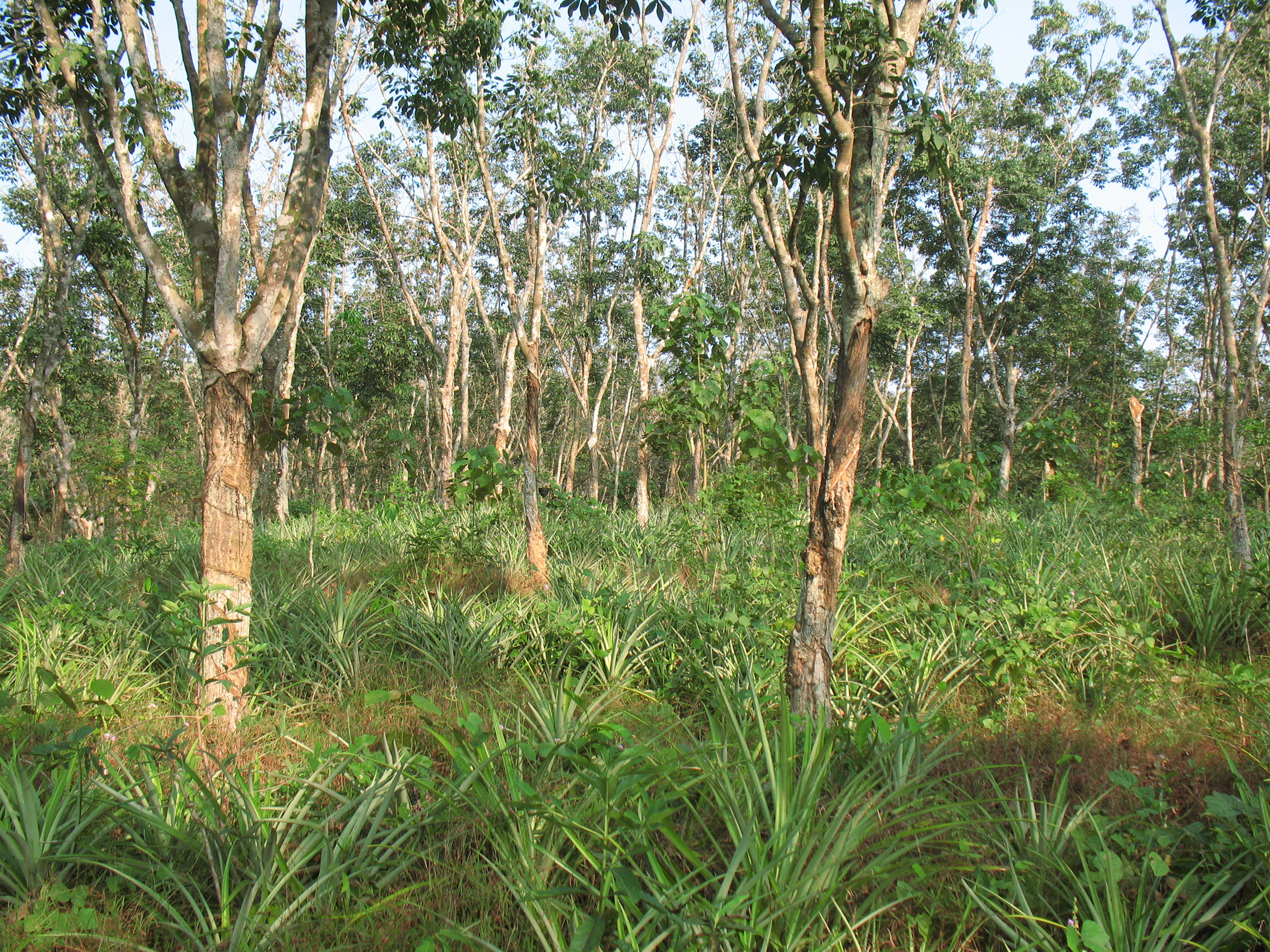 വിളപ്പിൽശാല എസ്റ്റേറ്റ്. റബറിന്‌ ഇടവിളയായി കൈതചക്ക കൃഷി ചെയ്തിരിക്കുന്നു